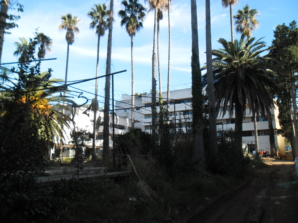 hotel Grand na Lopudu